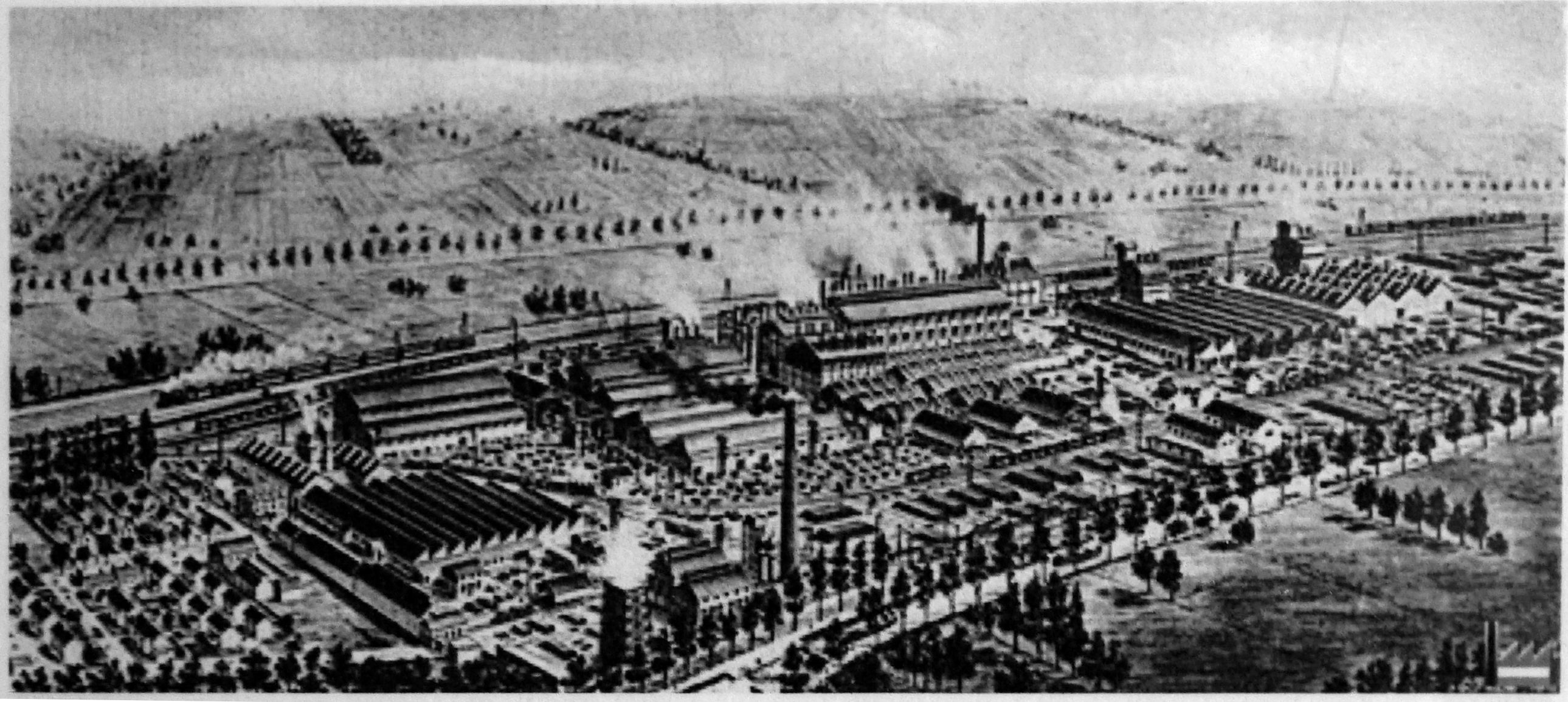 présenté au musée de Toul.